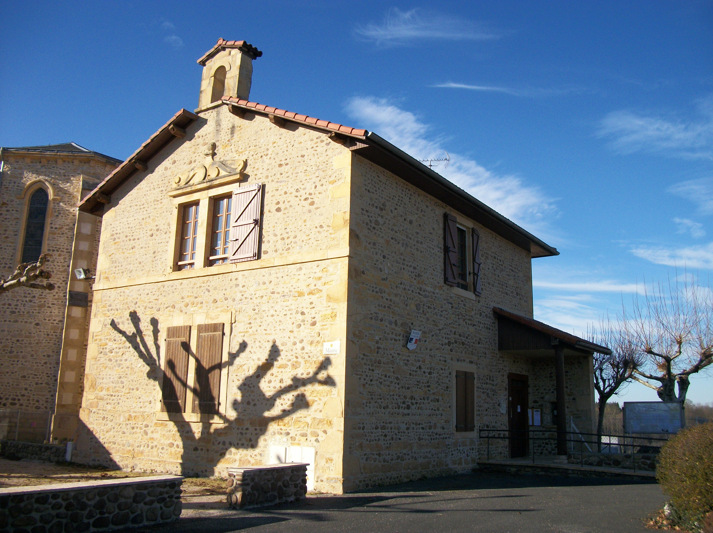 La Mairie